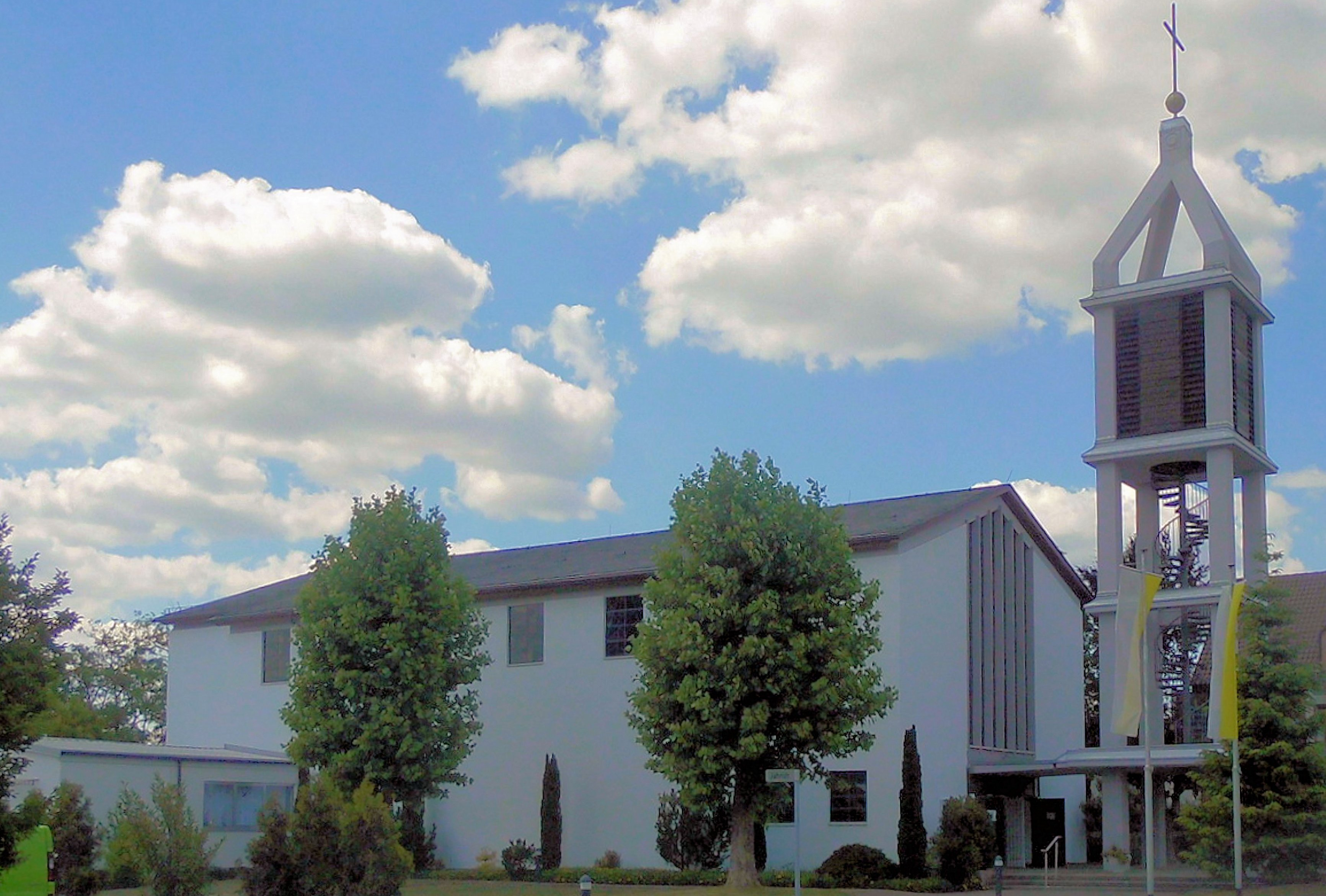 Kirche Maria Königin in Linkenheim, Gemeinde Linkenheim-Hochstetten, Deutschland